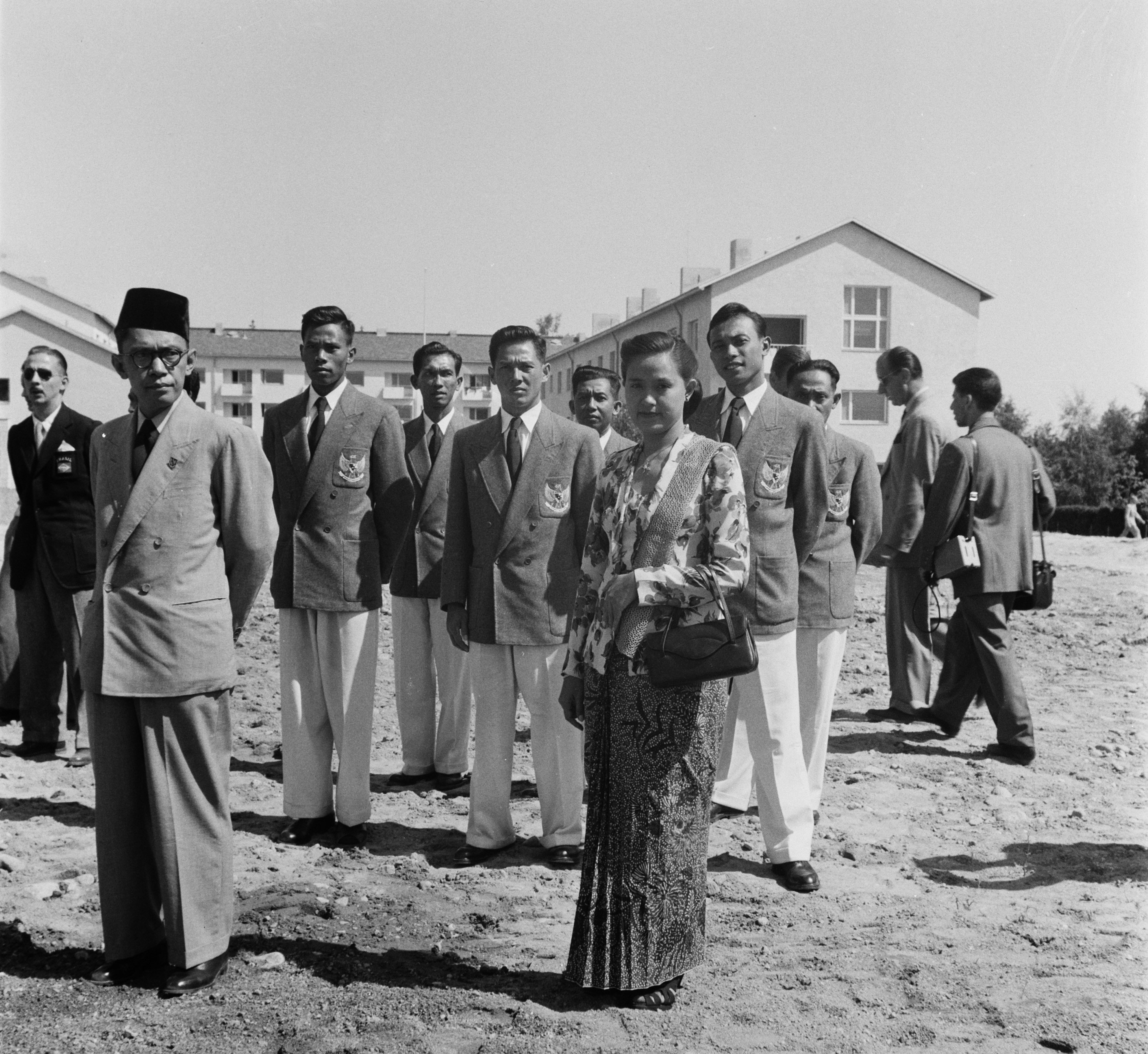 Olympische Zomerspelen Helsinki (1952) Aantal deelnemers uit Indonesie De drie mannelijke deelnemers waren Maram Sudarmodjo (hoogspringen). Habib Suharko (200 m borstcrawl zwemmen), Thio Ging Hwie (gewichtheffen) Datum 18 juli 1952